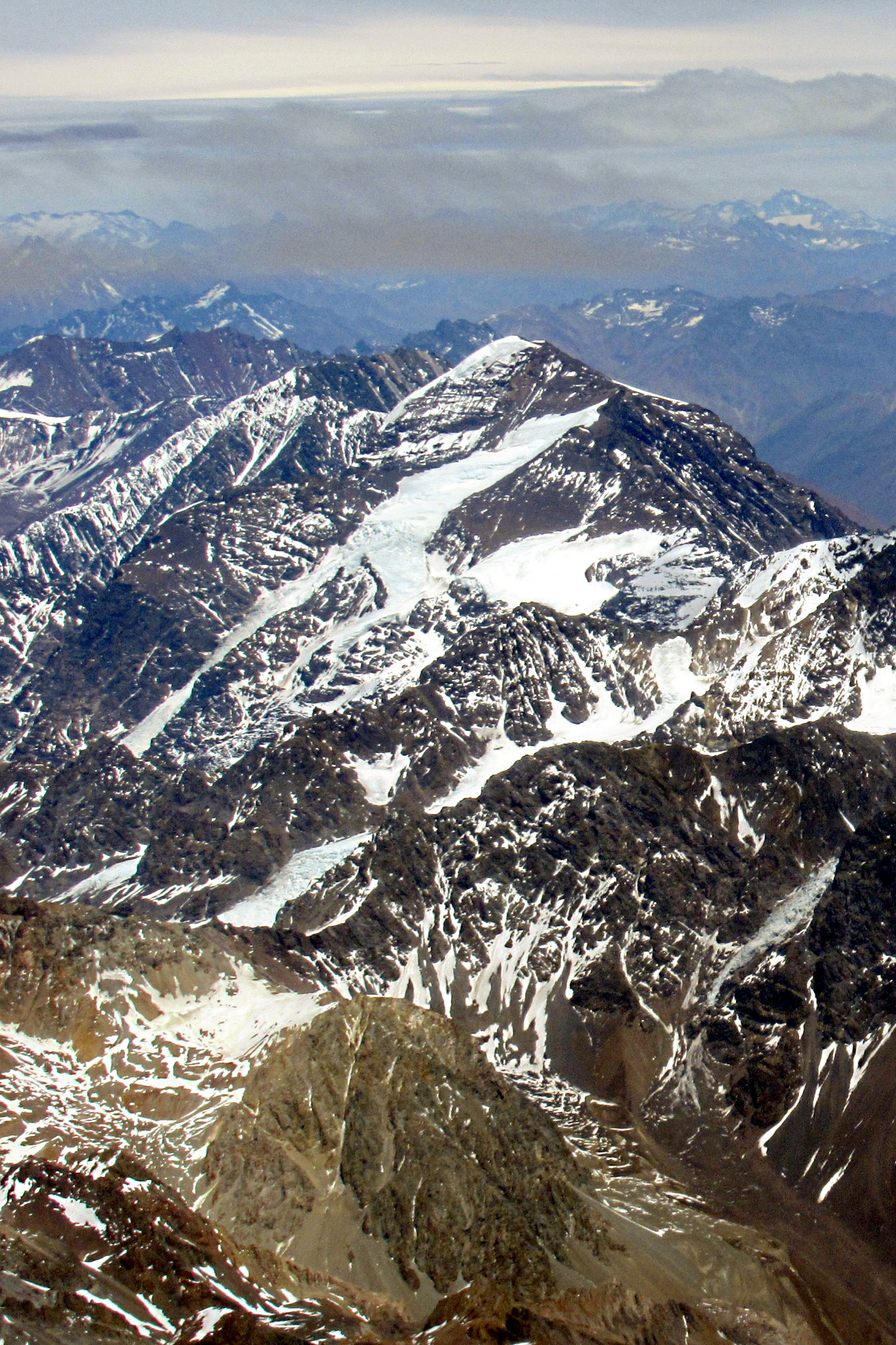 Nevado del Plomo (6070 m s.n.m., distancia 25 km hacia el sur), su lado nororiente en Argentina, con los glaciares Alfa y Beta a la vista. Altitud de vuelo 7150 m s.n.m. aproximadamente.